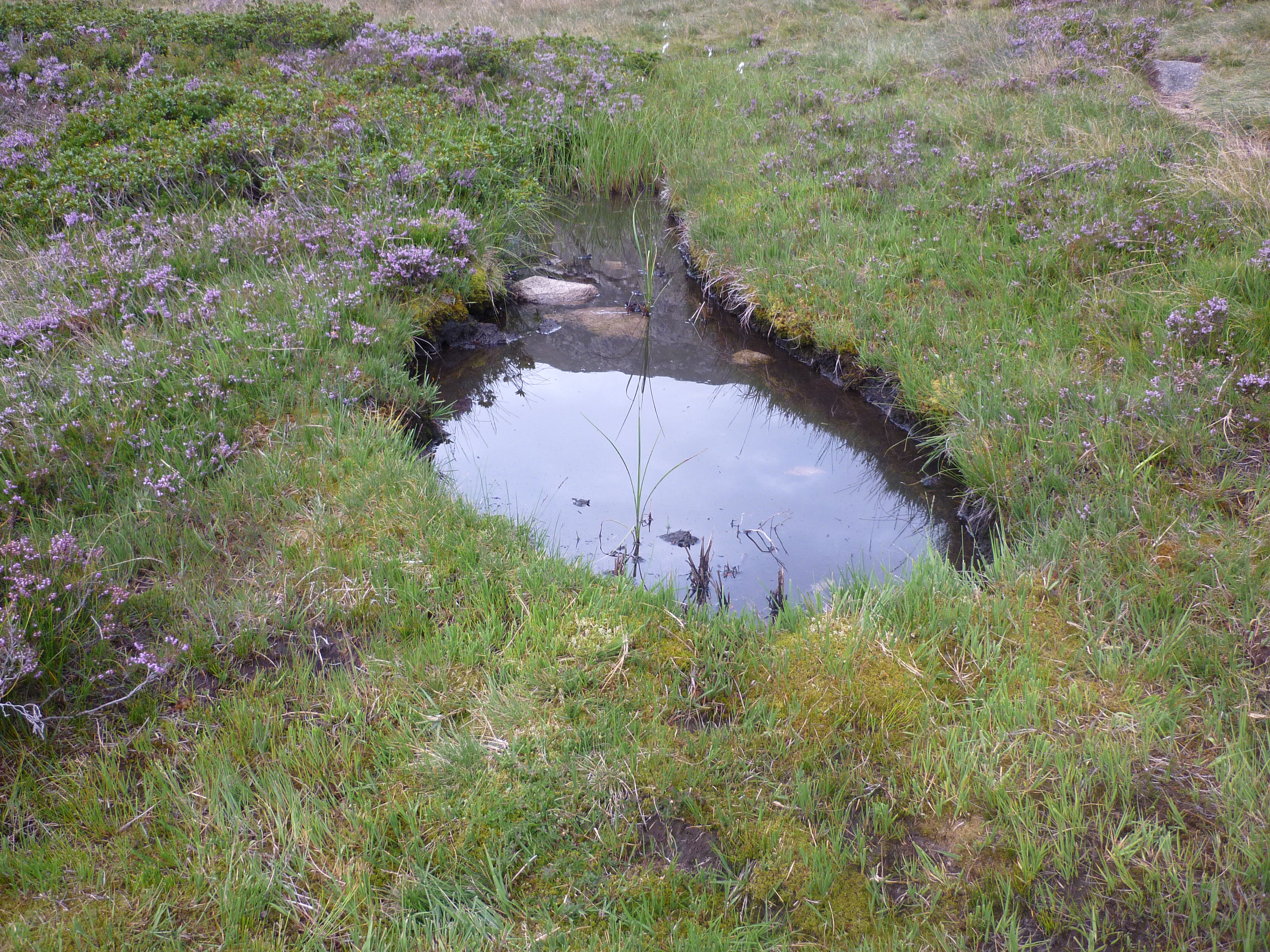 Toubière à Bassiès (Commune d'Auzat, Ariège)